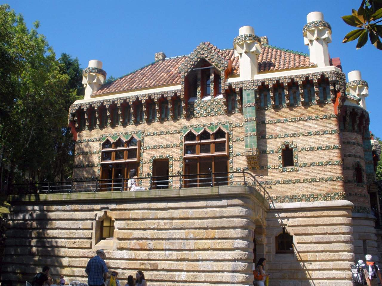 El Capricho, de Antoni Gaudí, en Comillas (Cantabria)